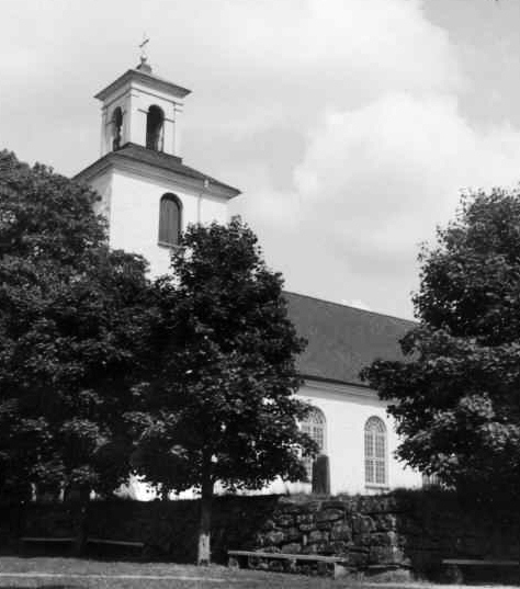 Tofteryds kyrka